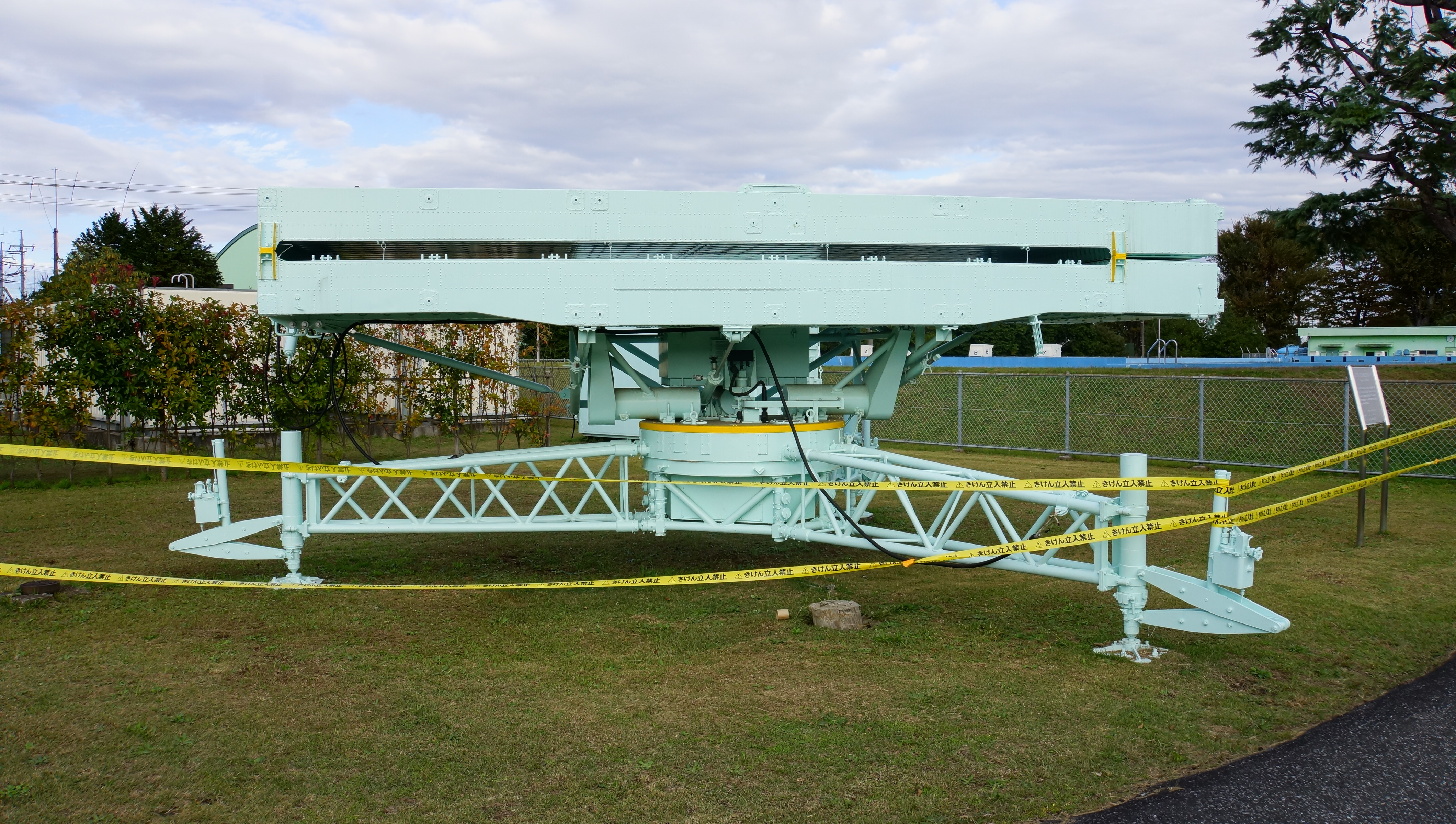 航空自衛隊 移動式三次元レーダー装置J/TPS-100（空中線装置）。2014年11月3日 入間基地にて。